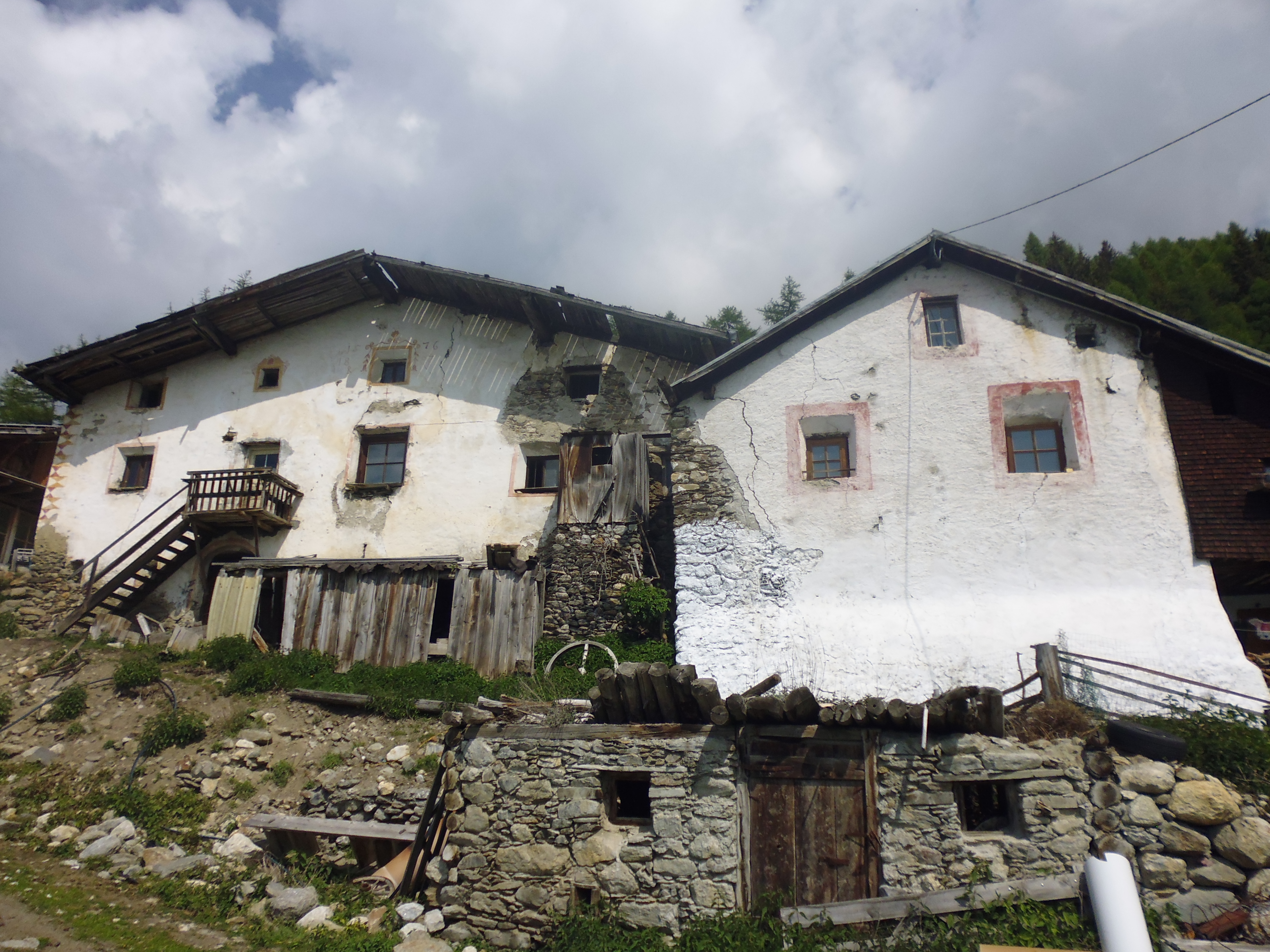 Hof Unterfrinig in der Fraktion Tanas von Laas (Südtirol) Rechts der Anbau, im Vordergrund die Reste des Stadls